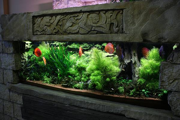 1.200 litros de Oliver Knott